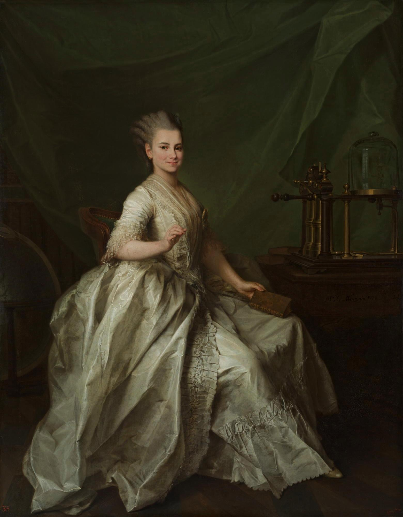 Molchanovalabel QS:Len,"Molchanova"label QS:Lru,"Портрет Е.И. Молчановой"